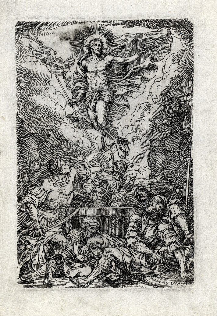 Auferstehung Christi, Kupferstich, 17. Jh.